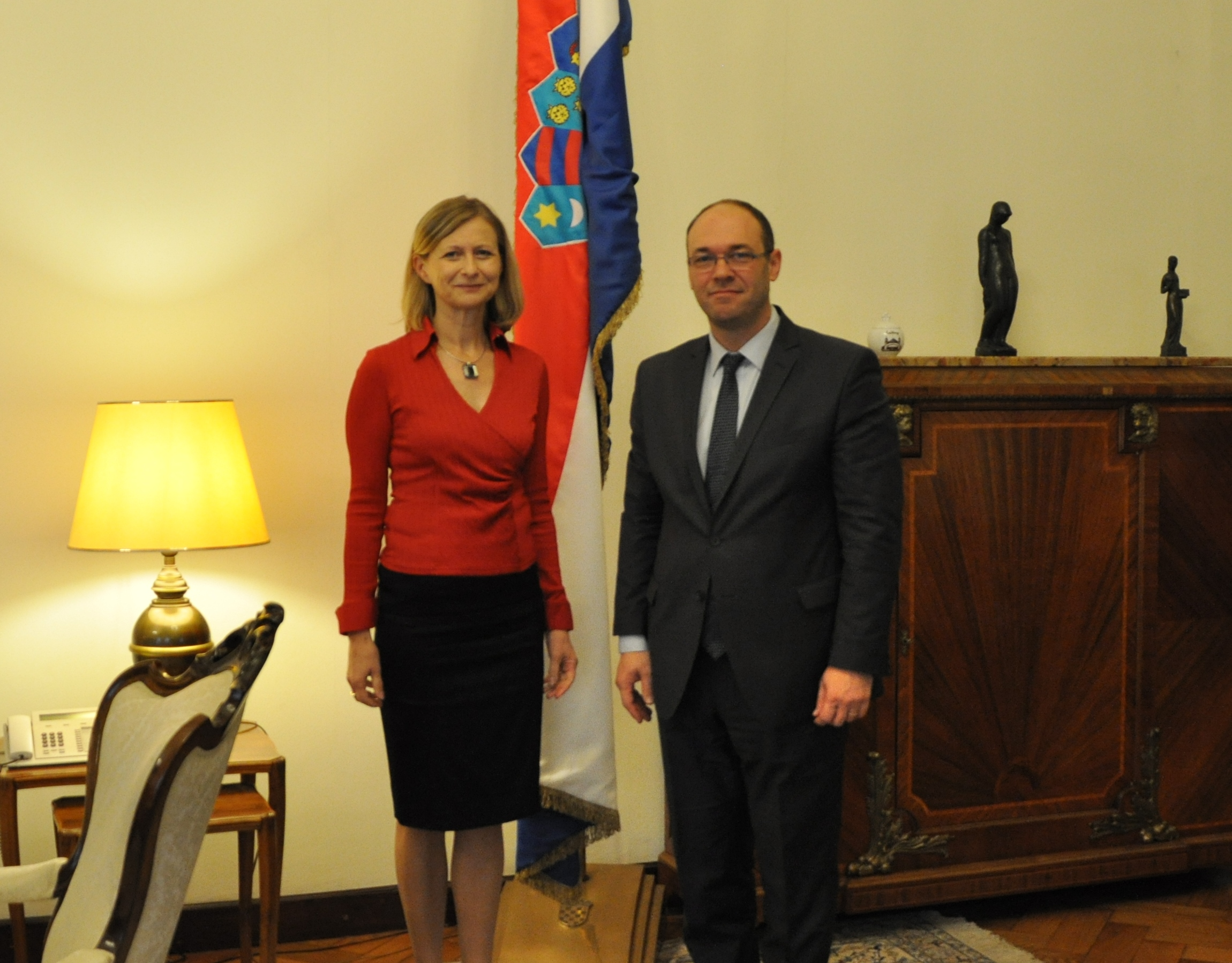 MVEP, 11. studenog 2016.